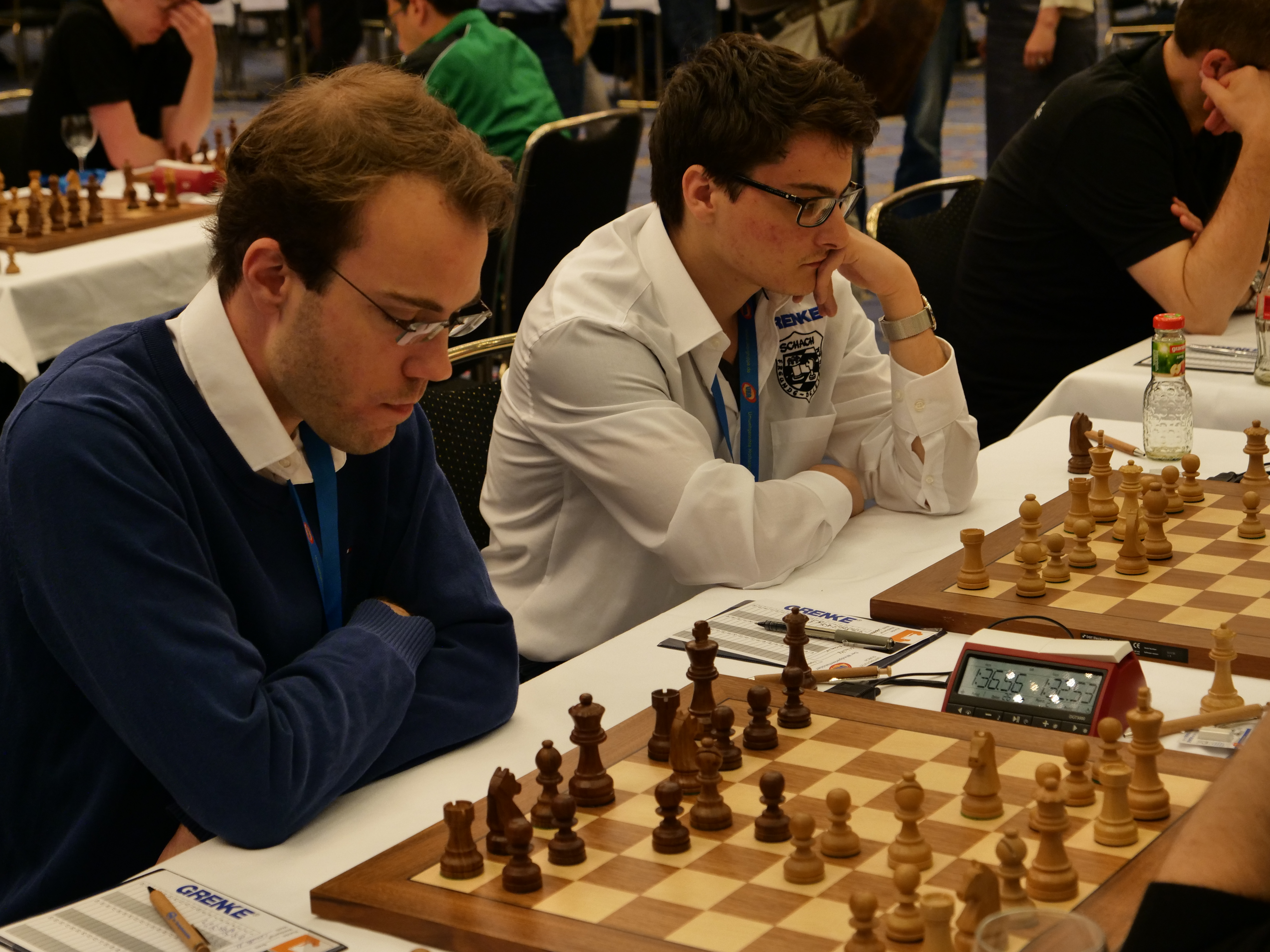 Meier und Lagarde Bundesliga-Endrunde 30-4-2018